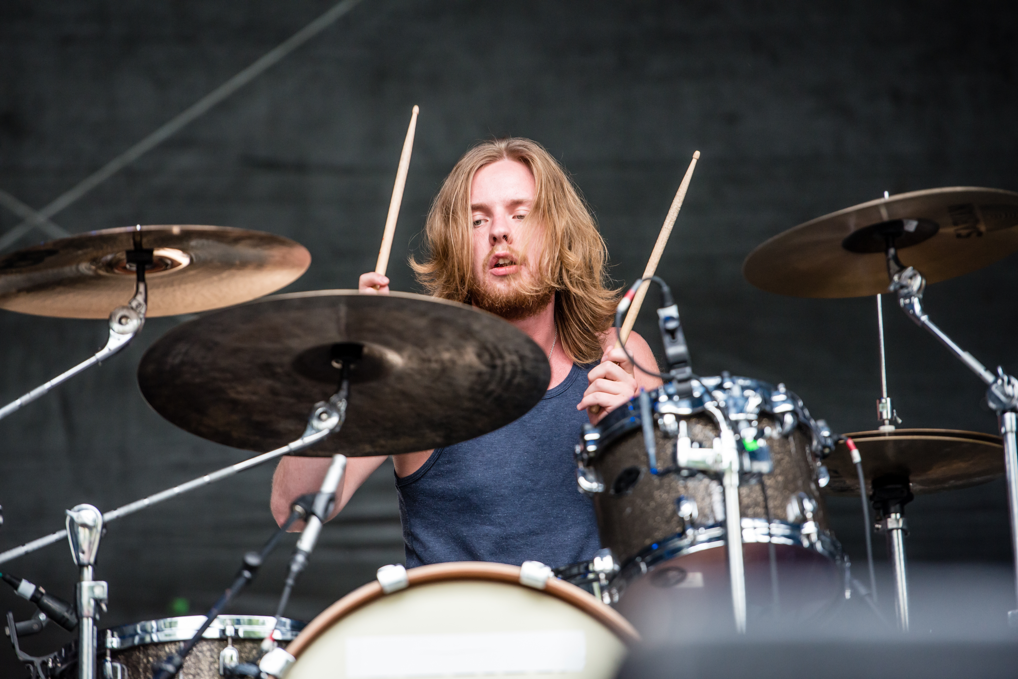 'Turock Open Air 2015; Essen': 'The Vintage Caravan'